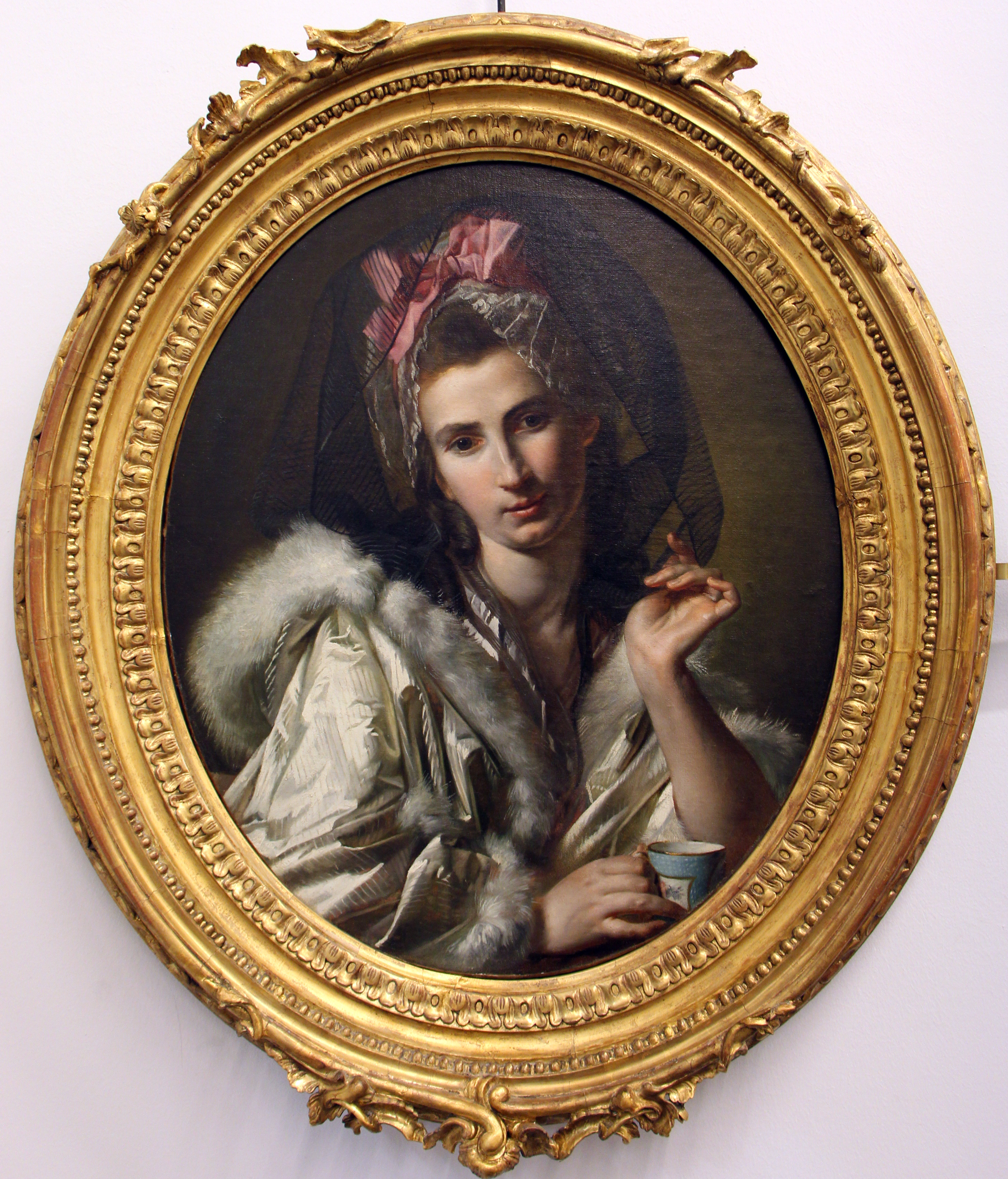 Palazzo Doria-Tursi - Musei di Strada Nuova This is a photo of a monument which is part of cultural heritage of Italy. The making of this document was supported by Wikimedia CH. (Submit your project!) For all the files concerned, please see the category Supported by Wikimedia CH.